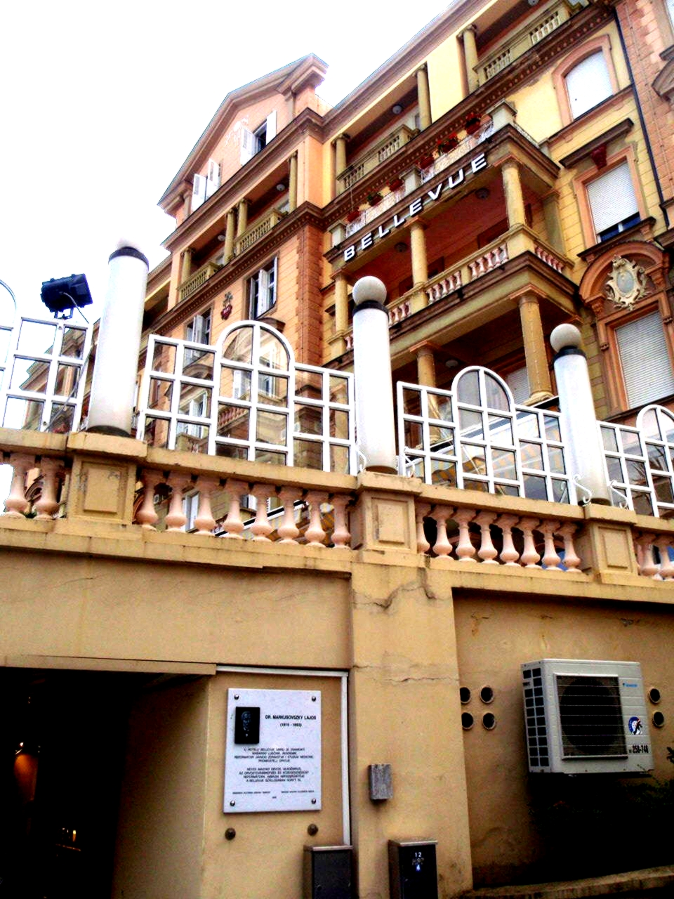 Denkmal von Markusovsky, Hotel Bellevue